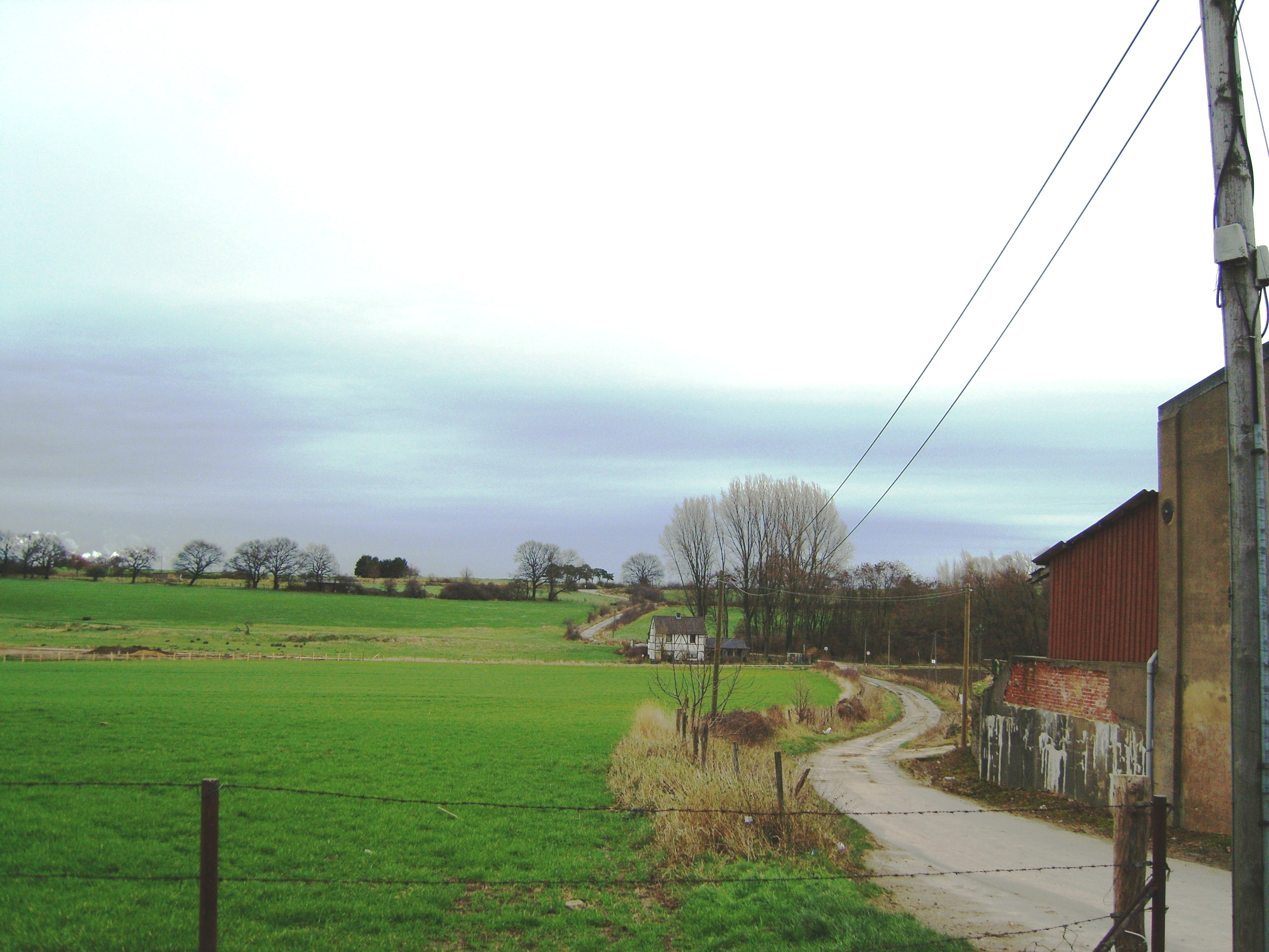 Korkus von der Volkenrather Straße (nordöstlicher Ortsausgang von Volkenrath) aus gesehen